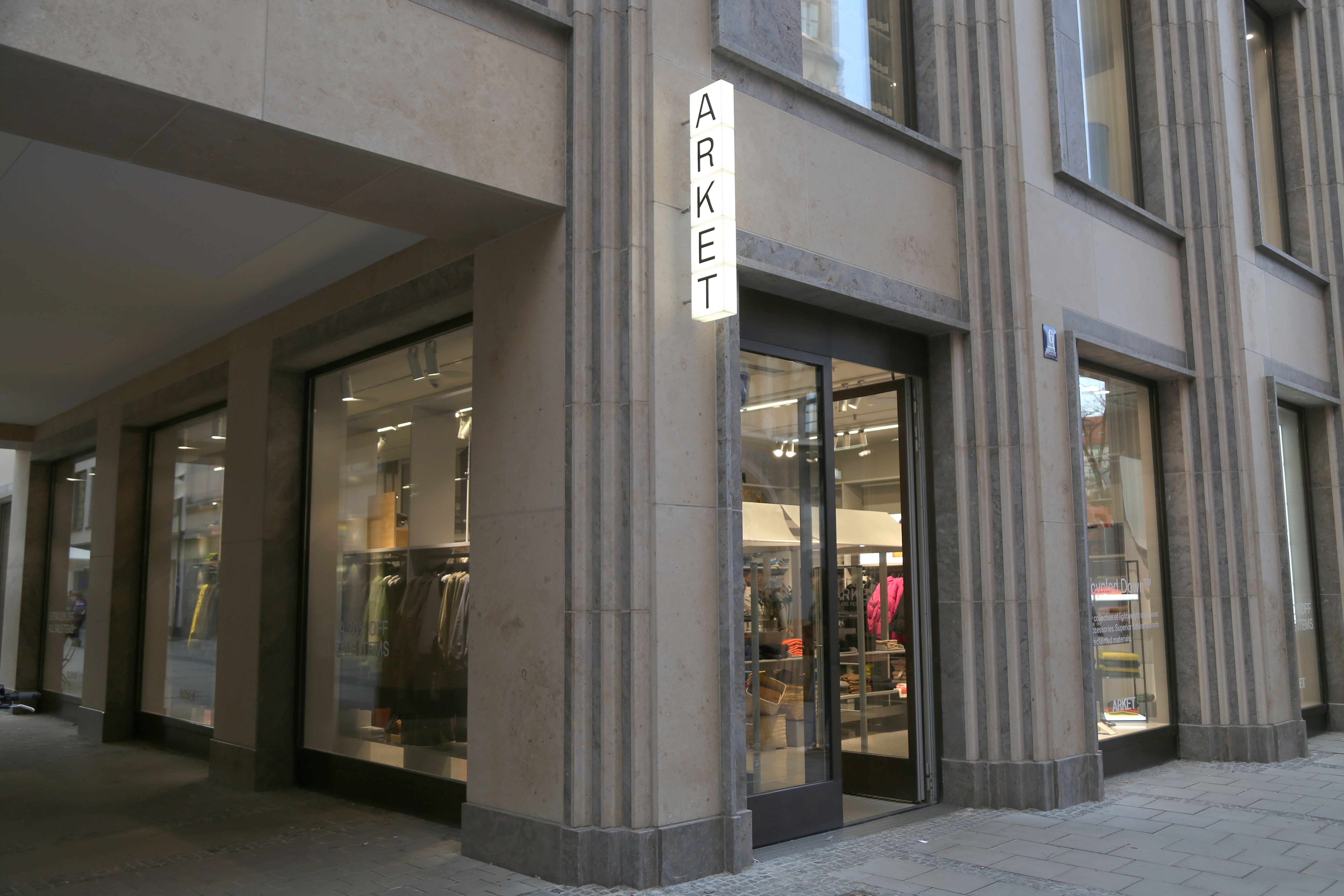 Arket-Filiale in München. Weinstraße.